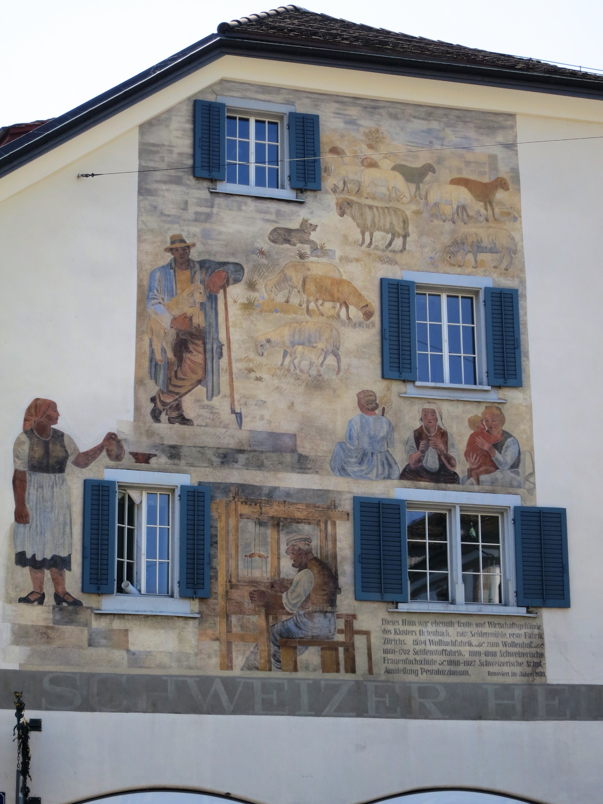 Wandmalerei von Wilhelm Hartung, Schweizer Heimatwerk, Zürich, Schweiz